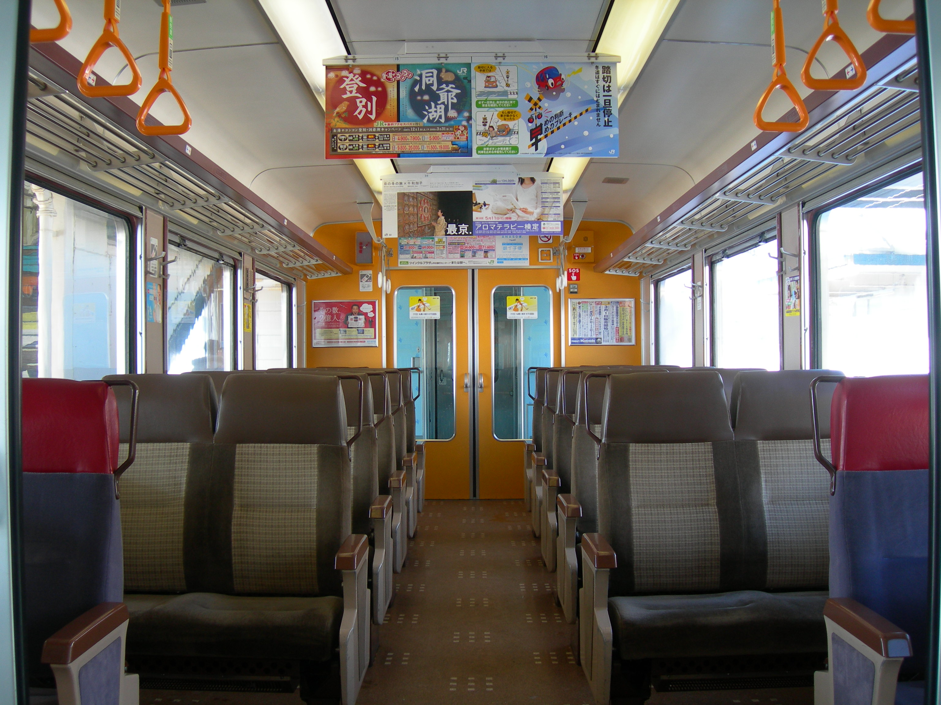 JR北海道721系電車 車内